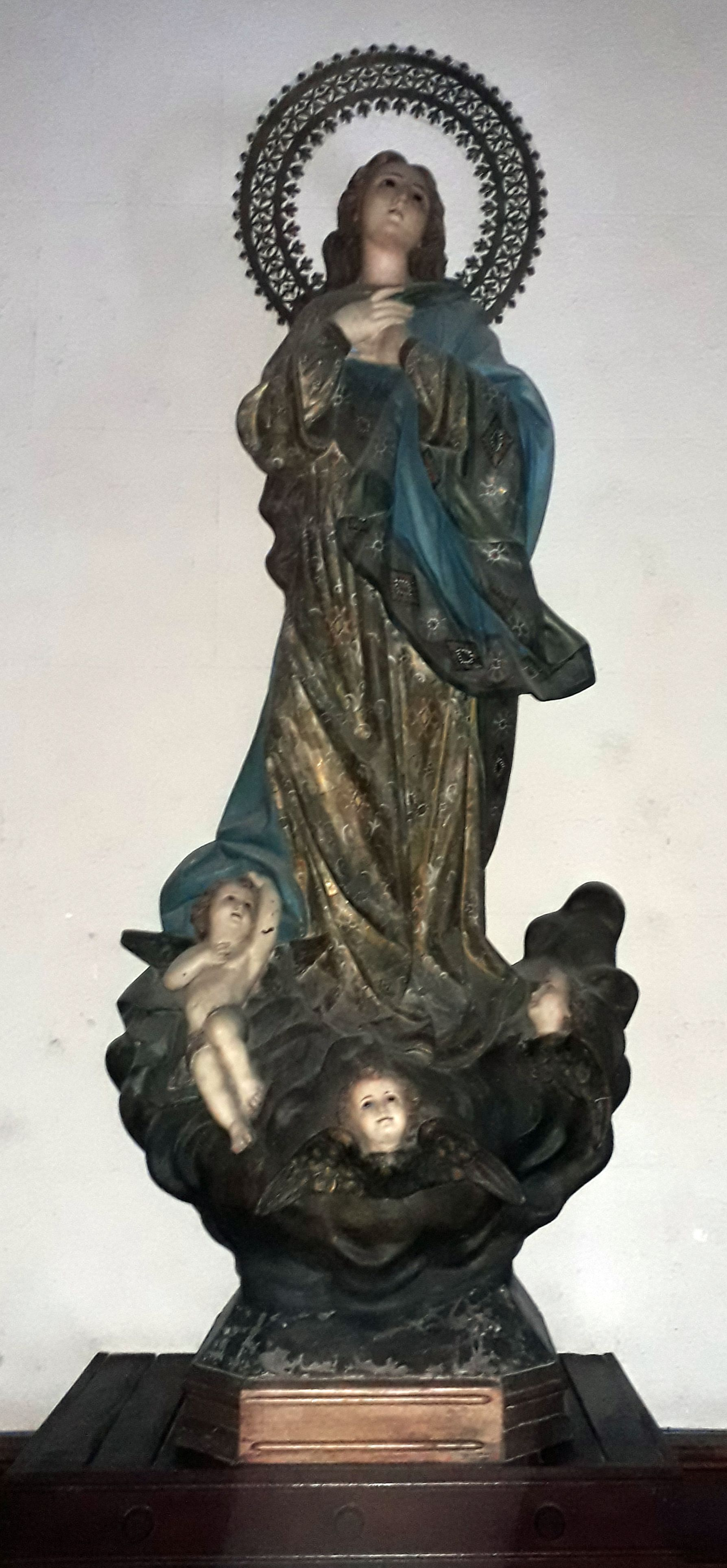 Imagen de la Inmaculada de la Sacristía de la Parroquia de San José de Jatibonico y Arroyo Blanco en Cuba.